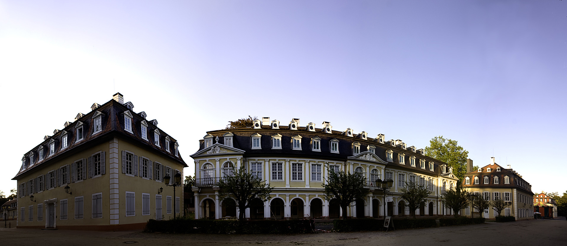 Kurgebäude der ehemaligen Kuranlage Wilhelmsbad in Hanau.